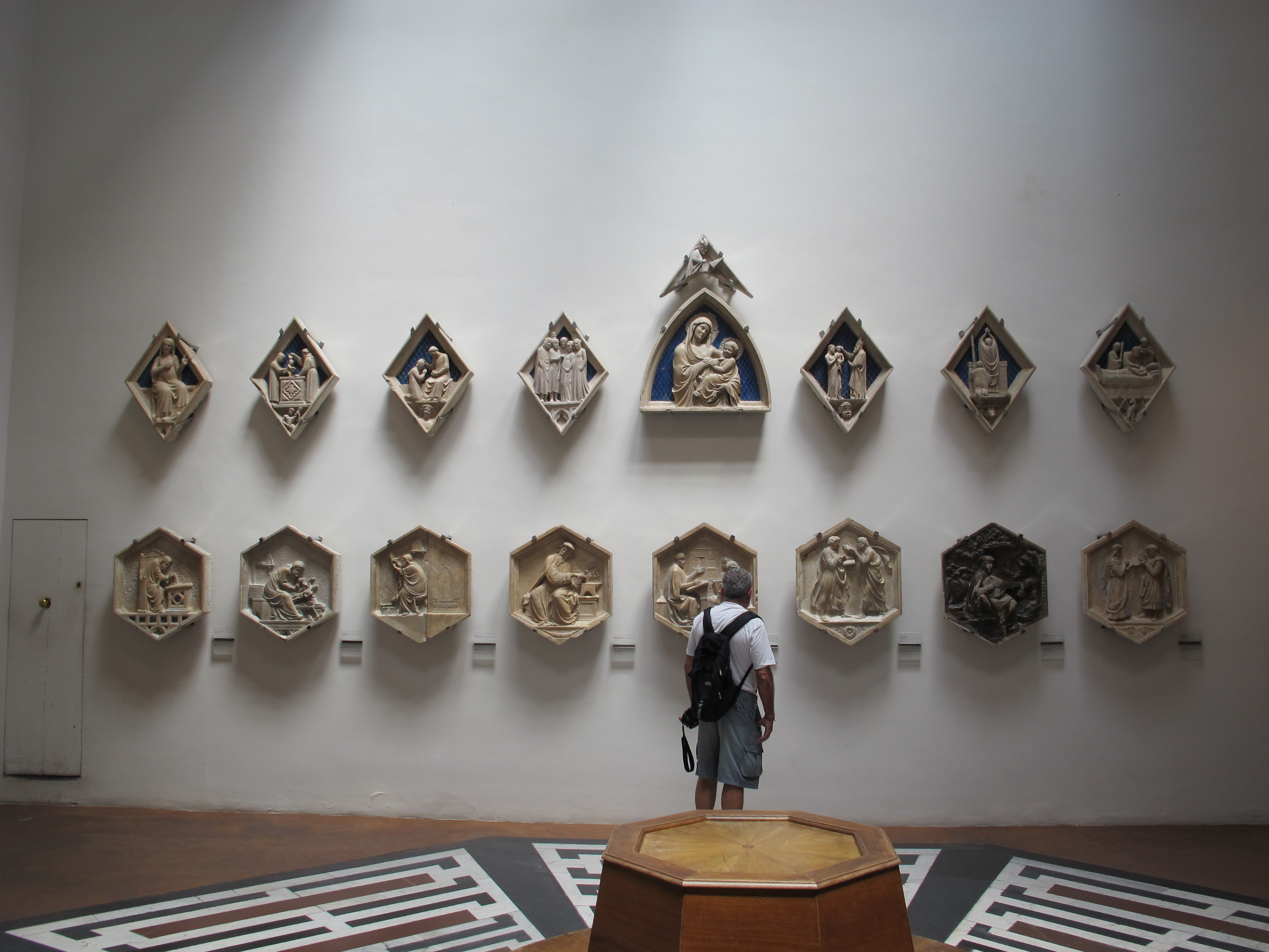 Museo dell'opera del duomo, sala delle formelle del campanile